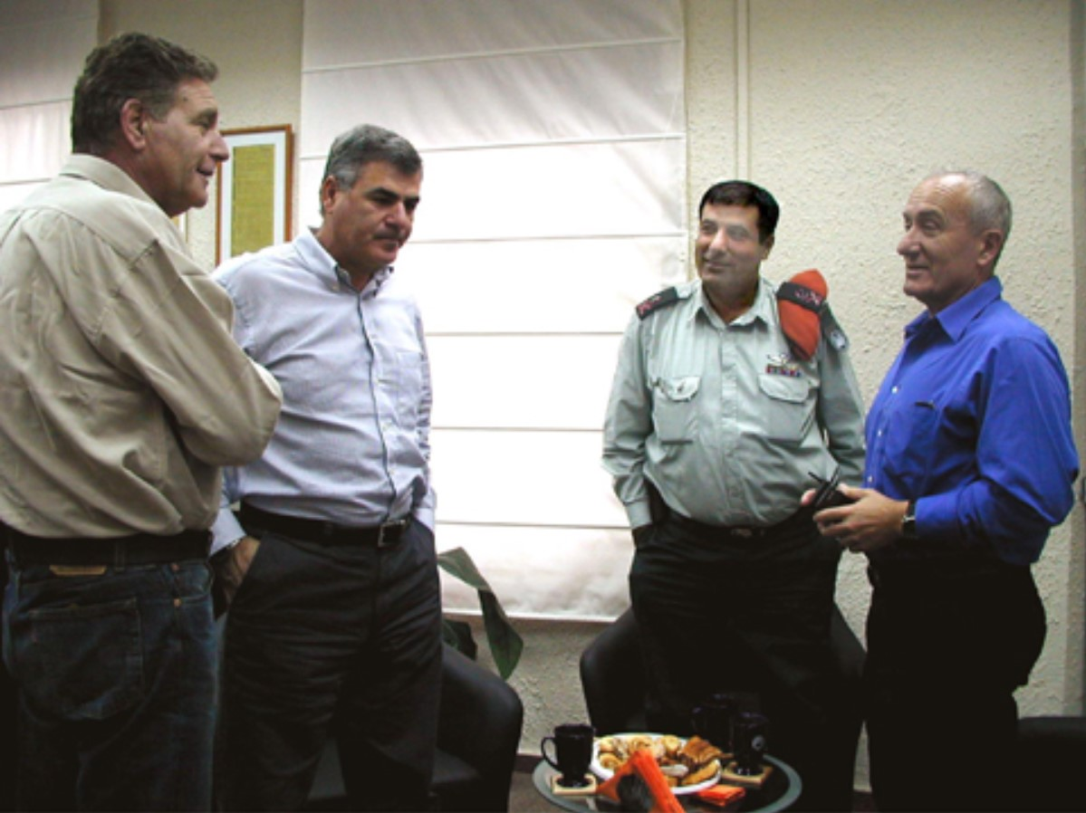 מפגש ייחודי של אלופי פיקוד העורף לדורותיהם מאז הקמת פיקוד העורף ב-1991. בתמונה מימין לשמאל: המפקד הראשון, האלוף זאב ליבנה, המפקד הרביעי והמכהן בתמונה, יוסף מישלב, המפקד השלישי, גבי אופיר והמפקד השני, שמואל (שמוליק) ארד.